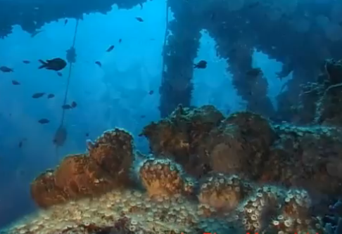 Flora e fauna presente presso Il Paguro